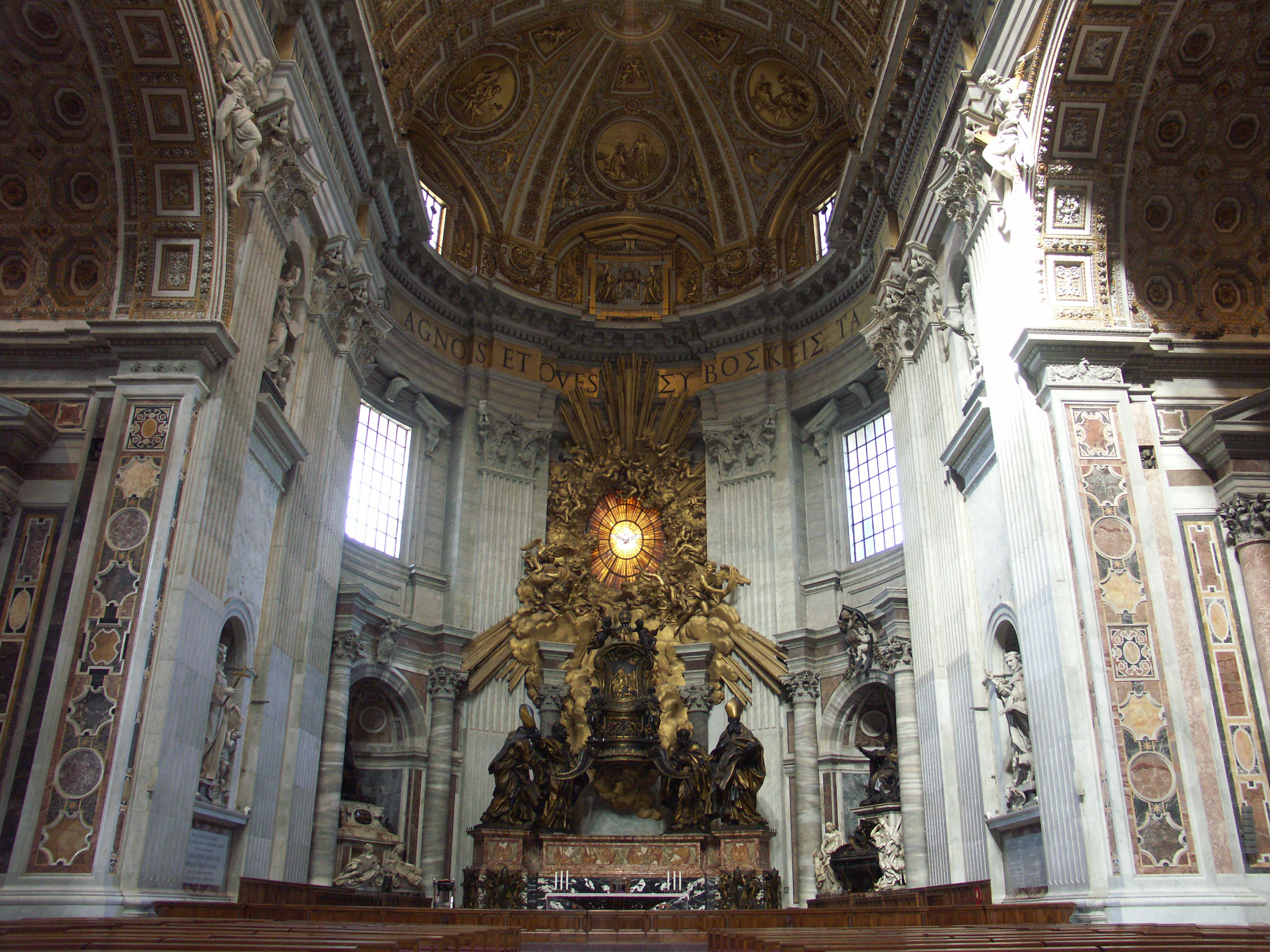 Rom, Vatikan, Petersdom, Hochaltar mit Cathedra Petri (Bernini)